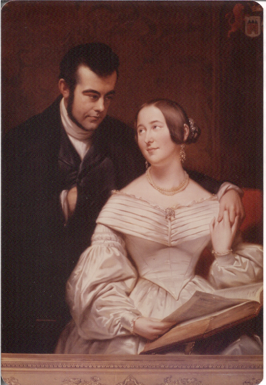 Privéfoto gemaakt met toestemming van Museum Commanderie van St. Jan, Nijmegen. Een familieportret dat destijds door de familie van den Berch is geschonken aan het museum. Olieverf portret nu in het bezit van Museum het Valkhof, Nijmegen.